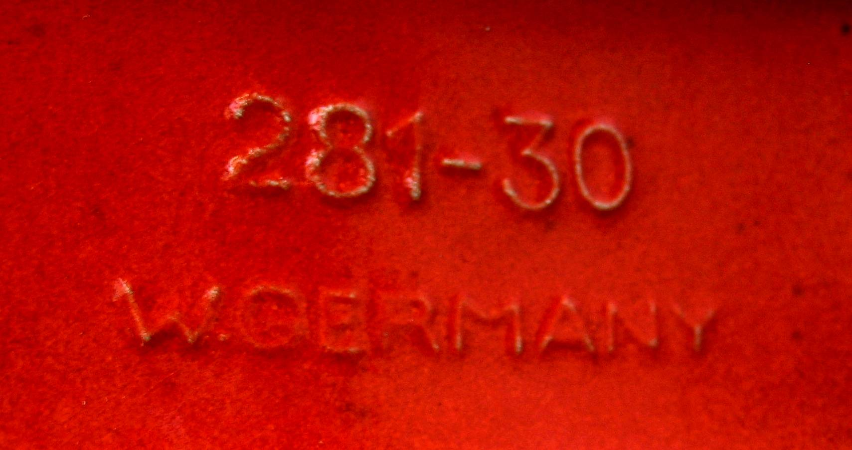 Vase type "Fat Lava", signature Studio Scheurich, Allemagne vers 1960